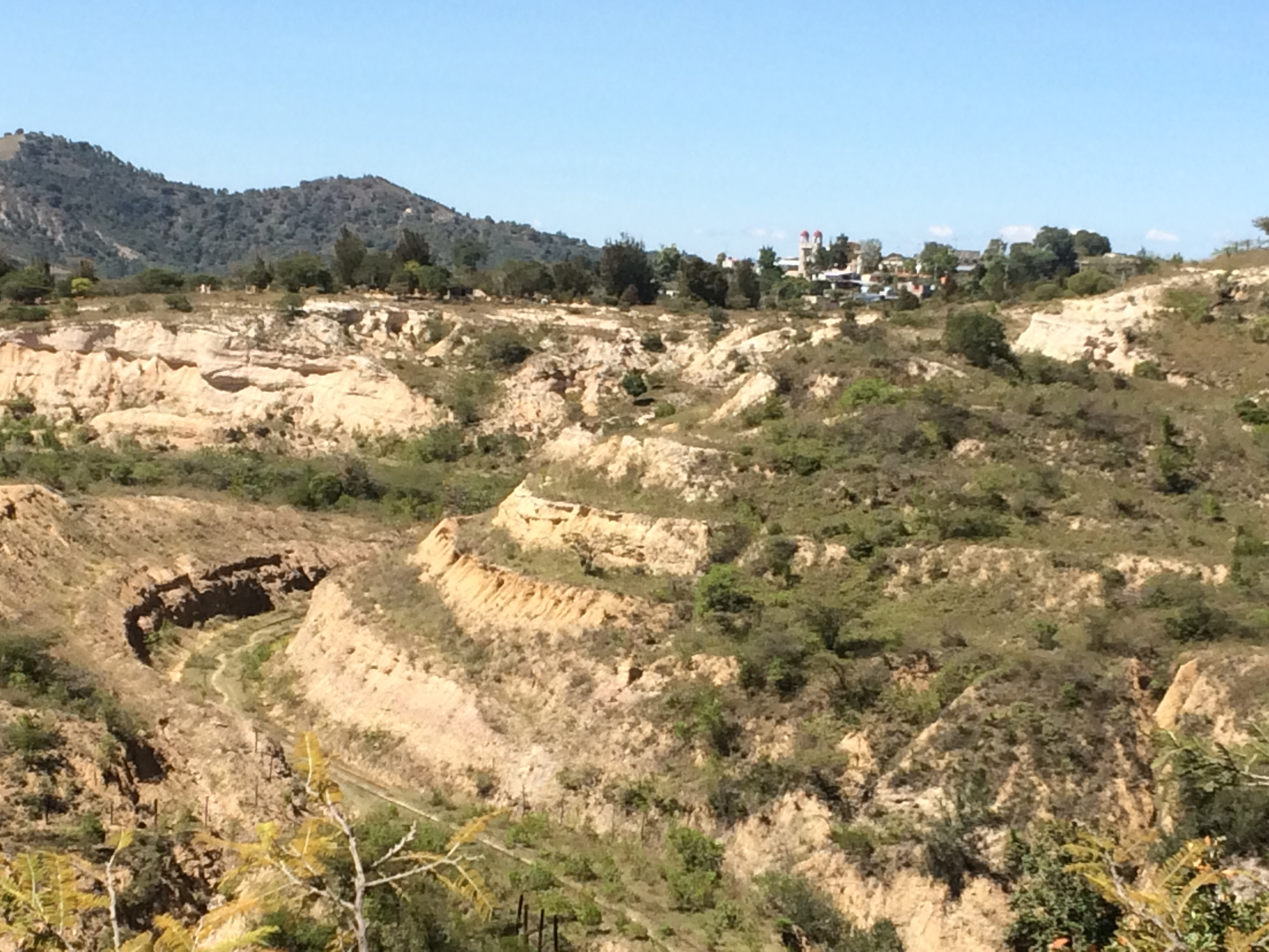 La vía del tren llegaba a San Sebastián Sedas.